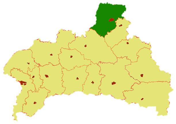 Baranavický rajón v rámci Brestské oblasti